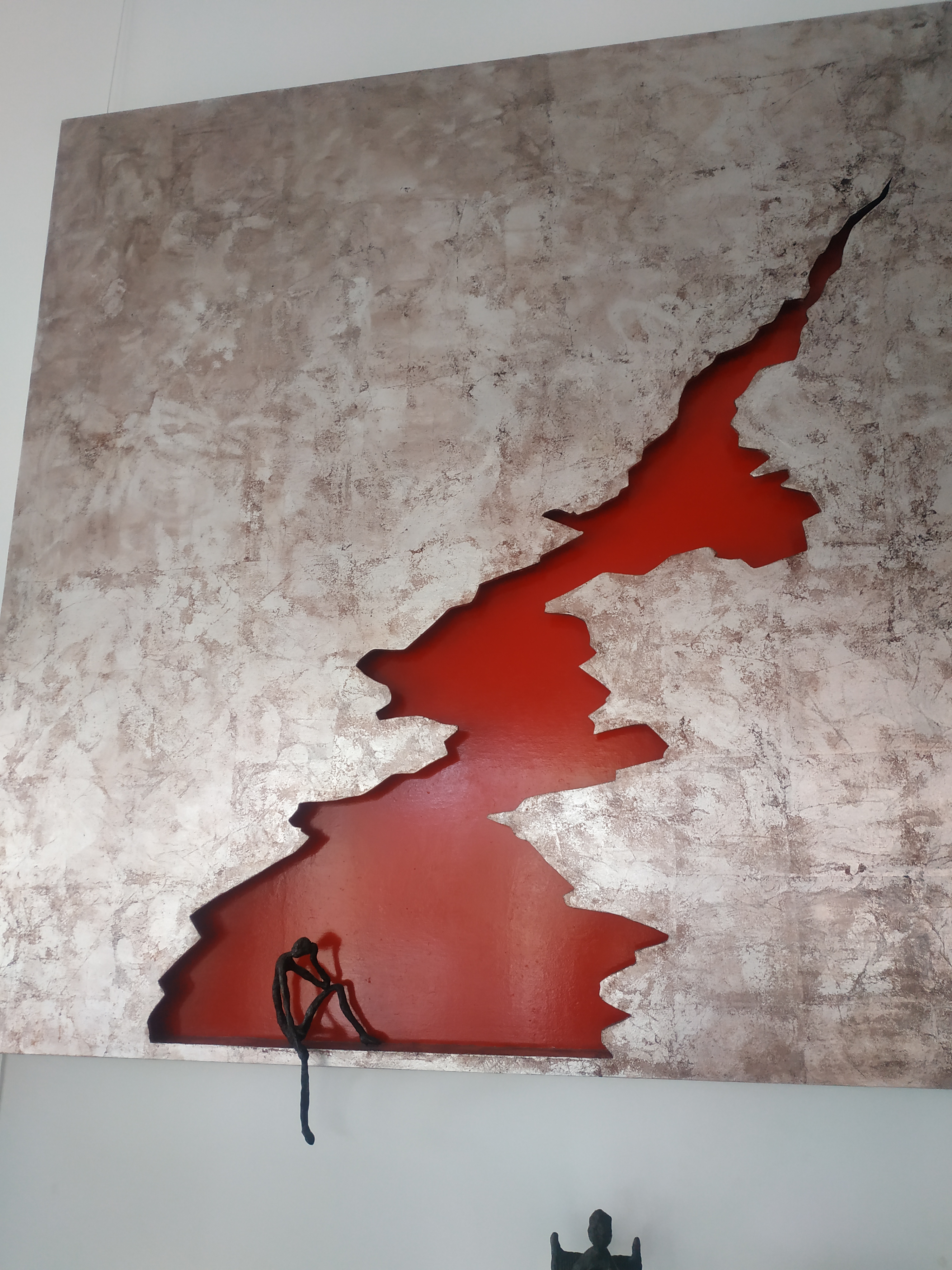 Автор фотографии я, Ильмира Контини (Франция)